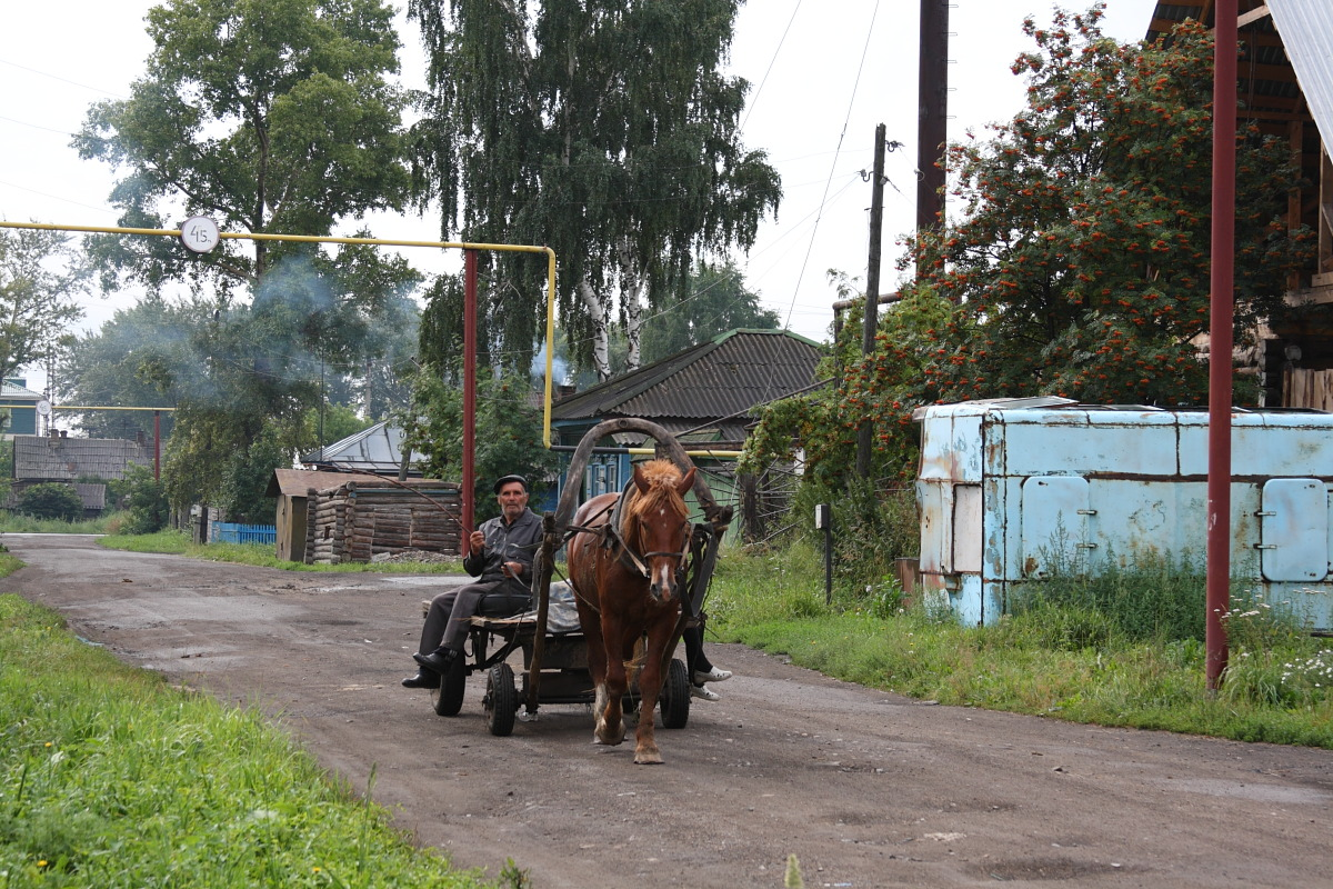 Bolotnoye, Novosibirsk Oblast, Russia